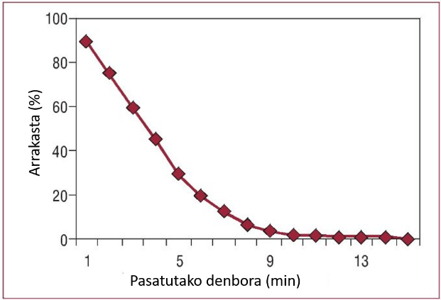 Irudi honek desfibriladoreak denbora pasa ahala duen arrakasta adierazten du.